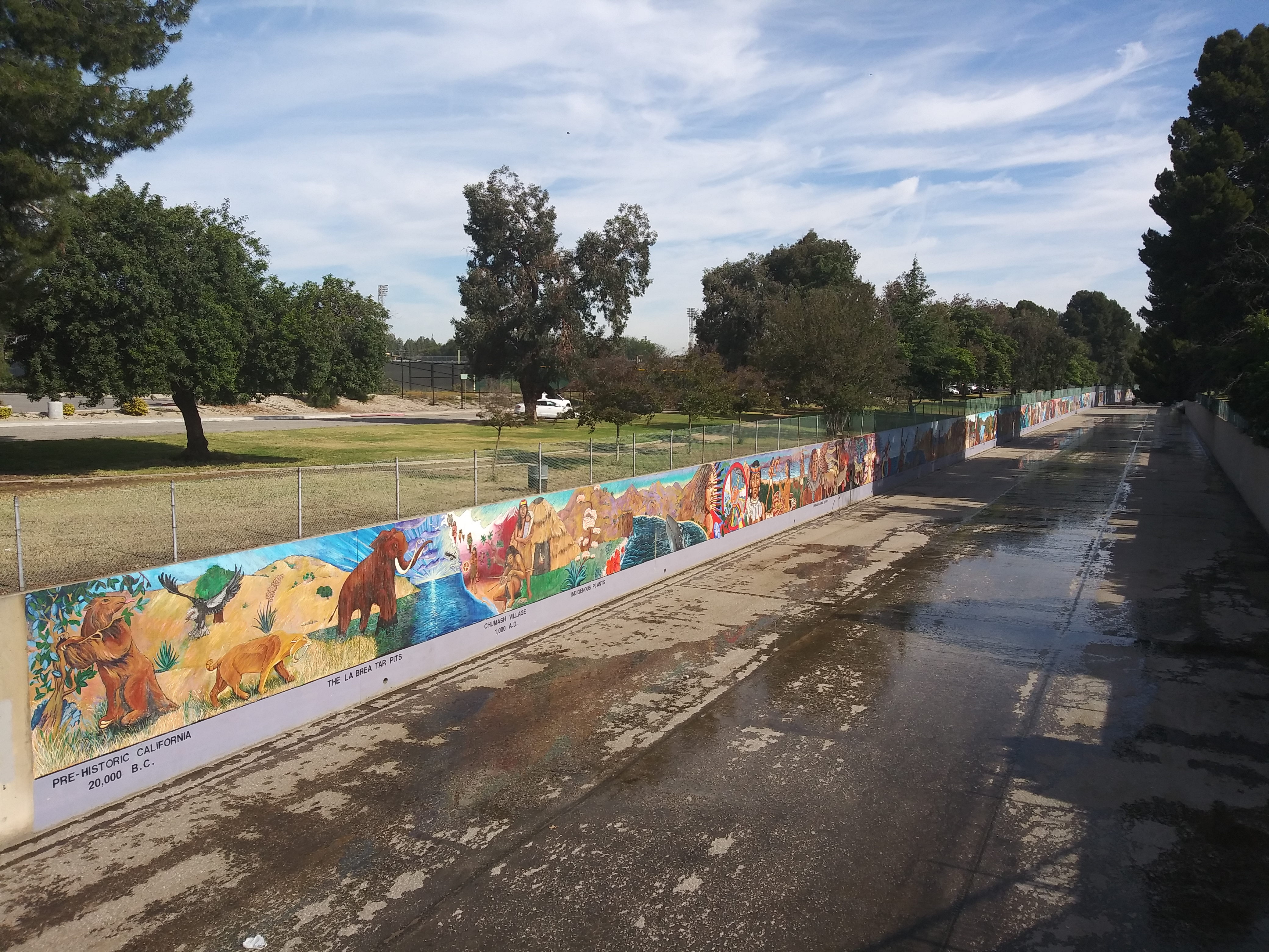 Der Tujunga Wash am Burbank Boulevard 2019. Blick nach Norden. Links das wahrscheinlich längste Wandbild der Welt, das hier beginnt.